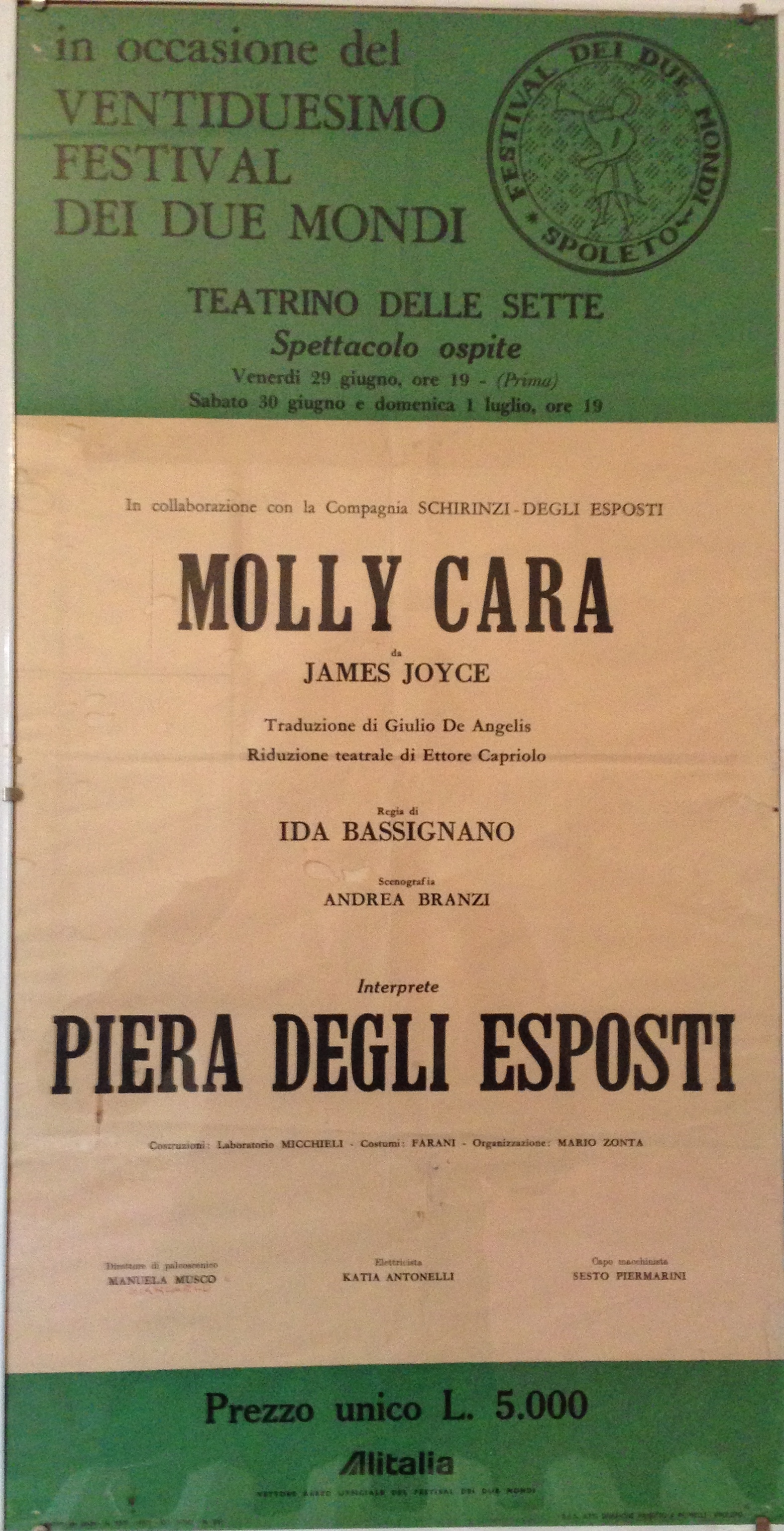 Locandina Molly cara, 22° Festival dei Due Mondi di Spoleto, 1979